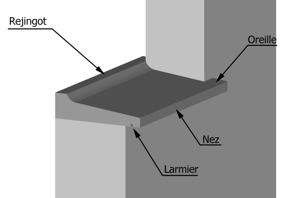 Terminologie de l'appui de fenêtre